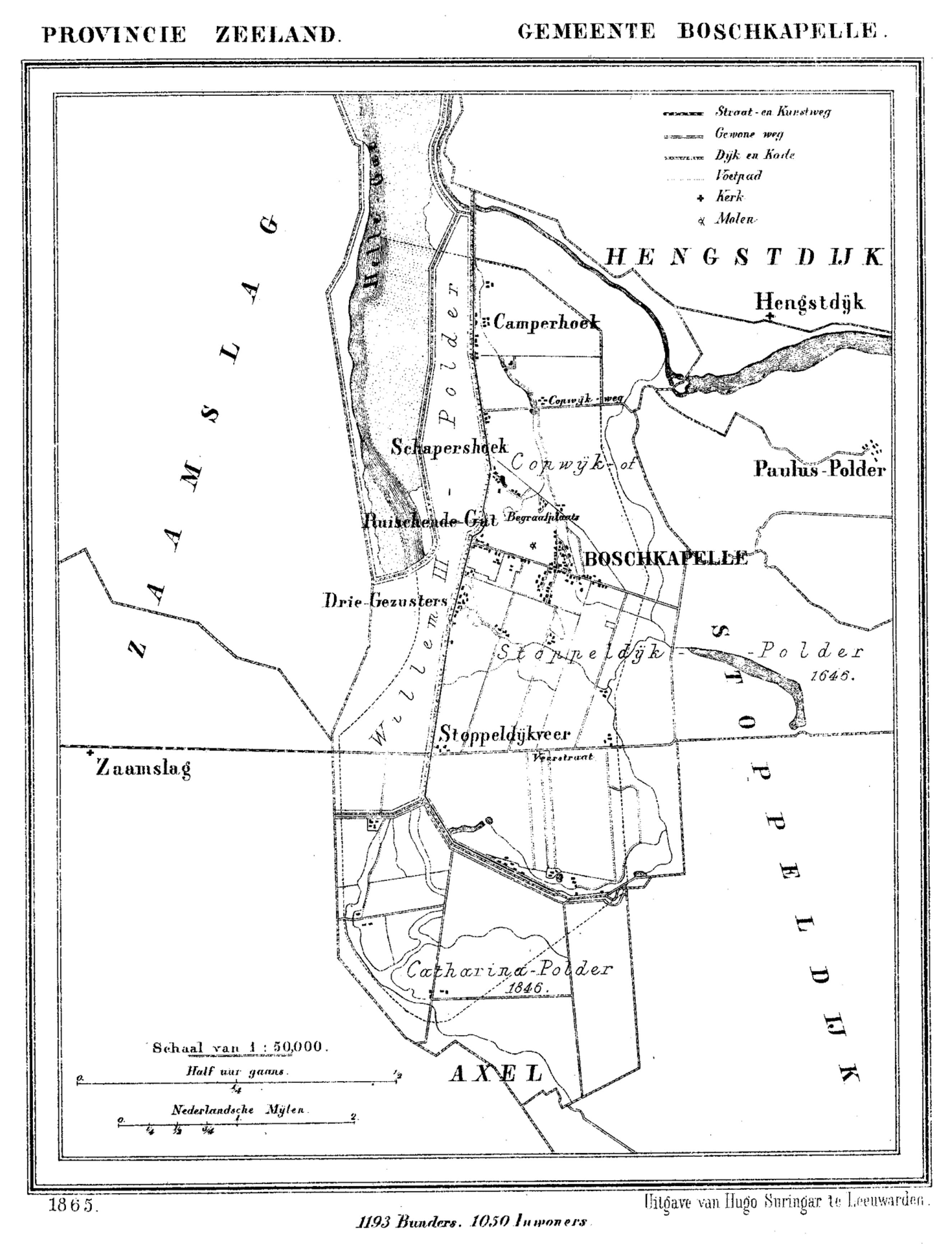 Gemeente Boschkapelle, Zeeland, Nederland